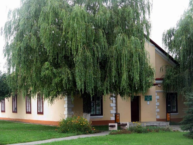 алейня